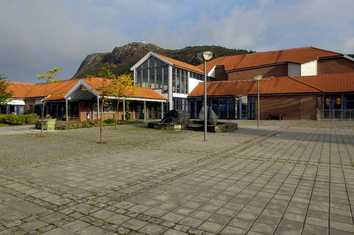 Tysværtunet kulturhus og Lars Hertervigs plass